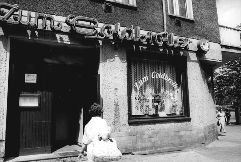 Berlin, Kanzowstraße, Gaststätte "Zum Goldbroiler" ADN-ZB Klaus Franke-16.10.90 Berlin: Gaststätte "Zum Goldbroiler" in der Kanzowstraße im Stadtbezirk Prenzlauer Berg.